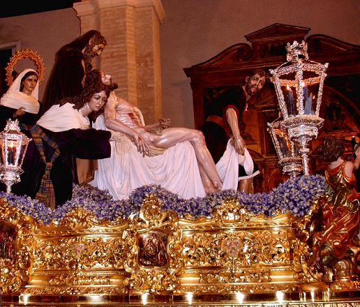 Imagen del paso de la Hermandad de Santa Marta, en Sevilla. Representa el trasalado de Jesucristo al sepulcro.